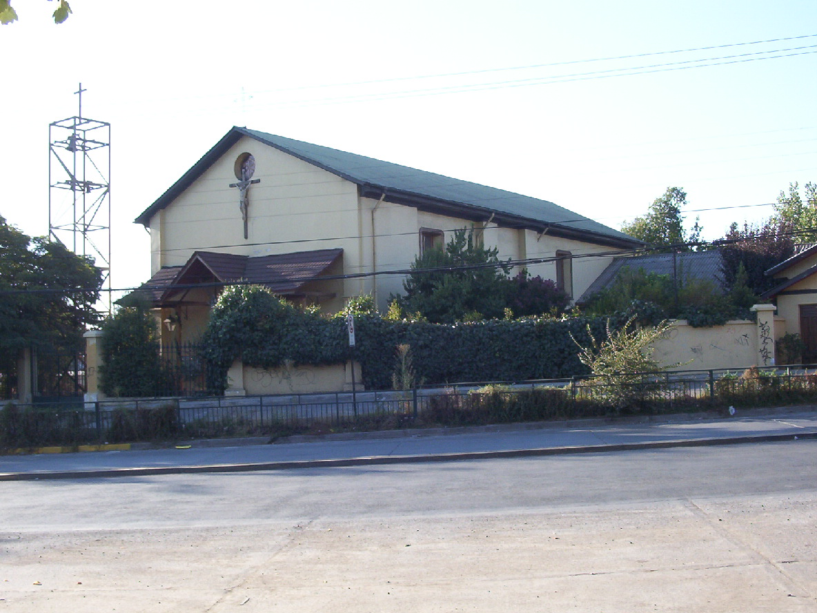 Capilla Nuestra Señra de Loreto , frente a Villa Grimaldi